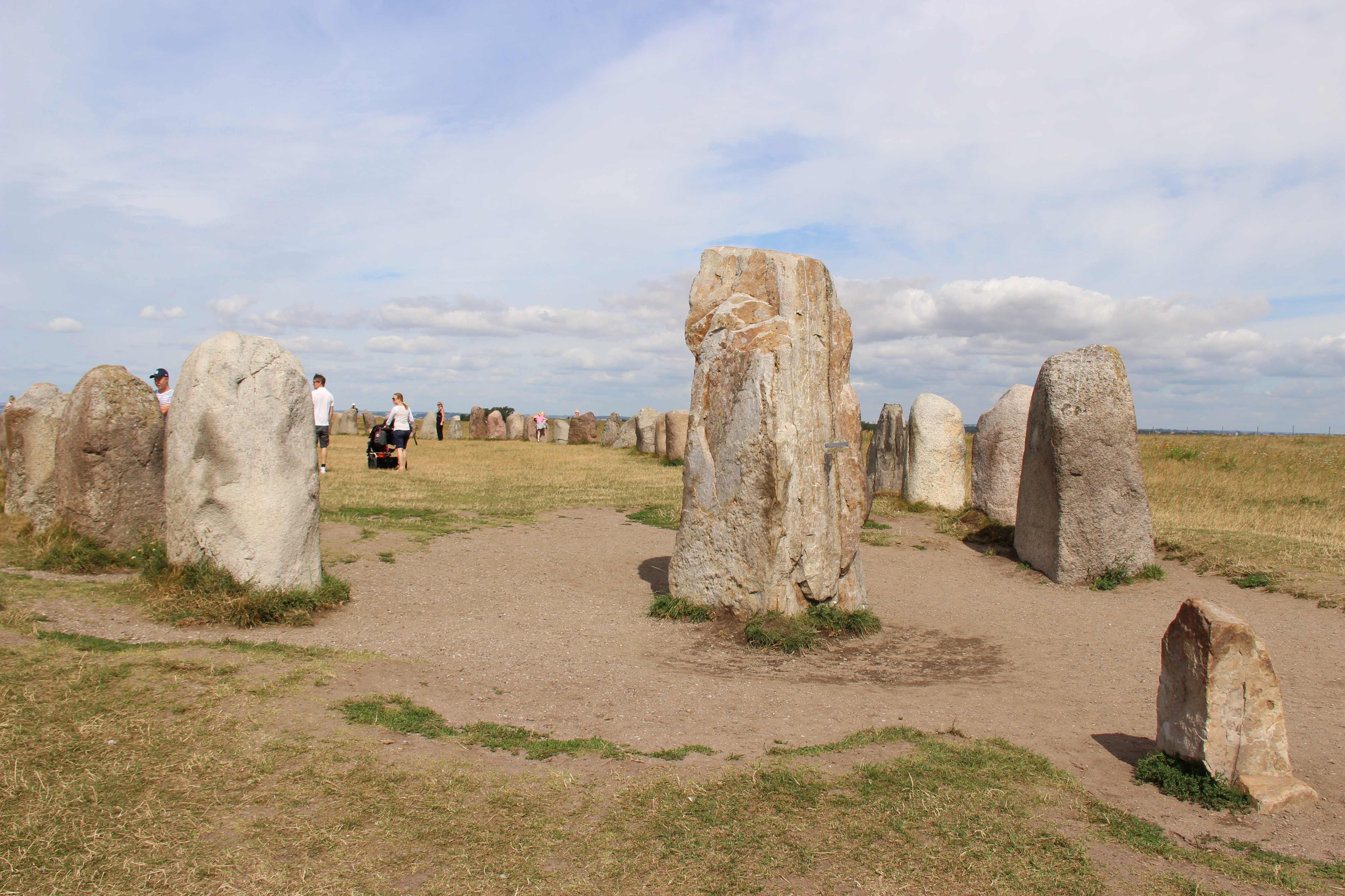 Ales stenar